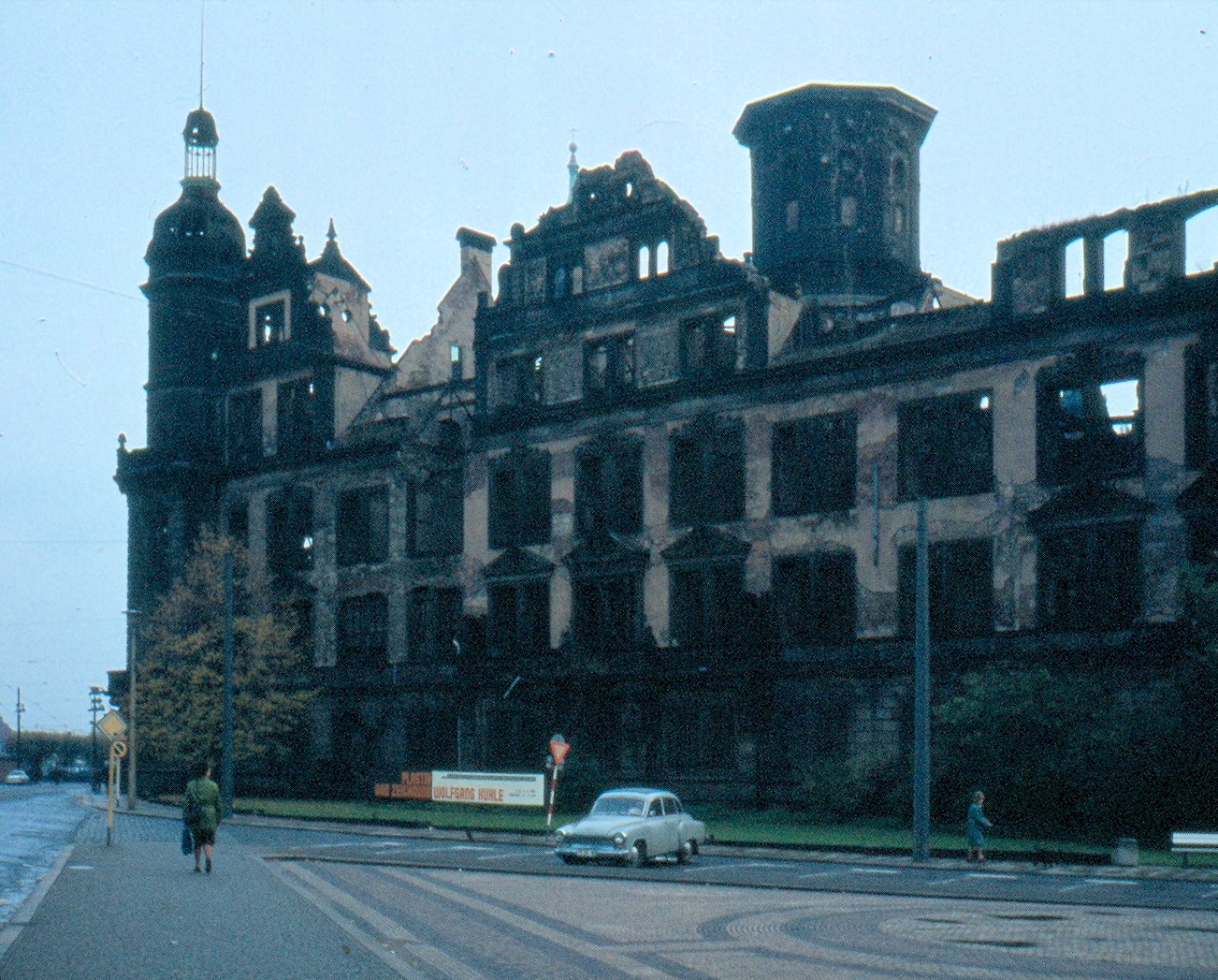 Das Dresdner Schloss im Oktober 1980; Plakat für eine Ausstellung von Wolfgang Kuhle